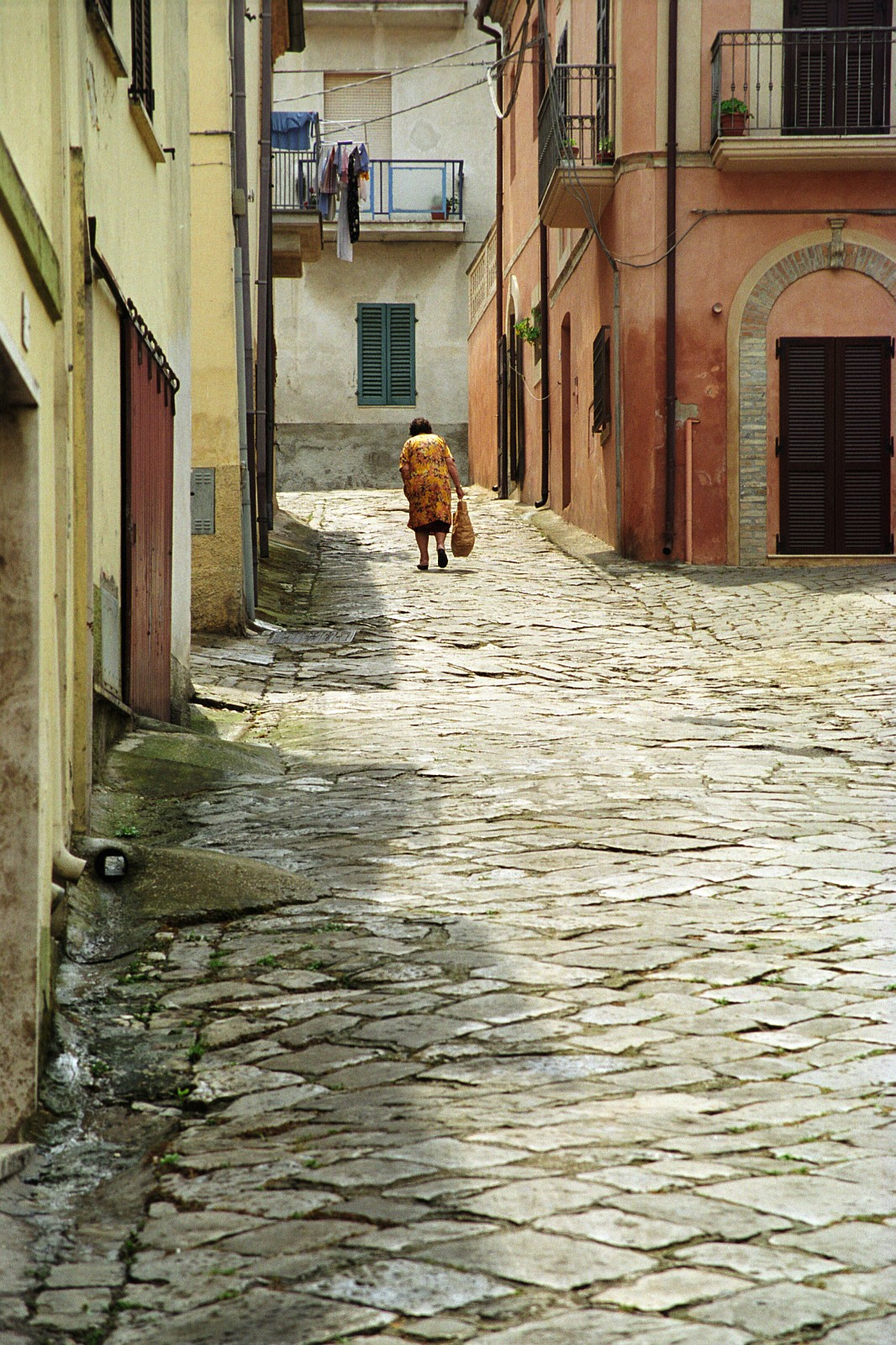 Teramo, Abruzzo, Italia